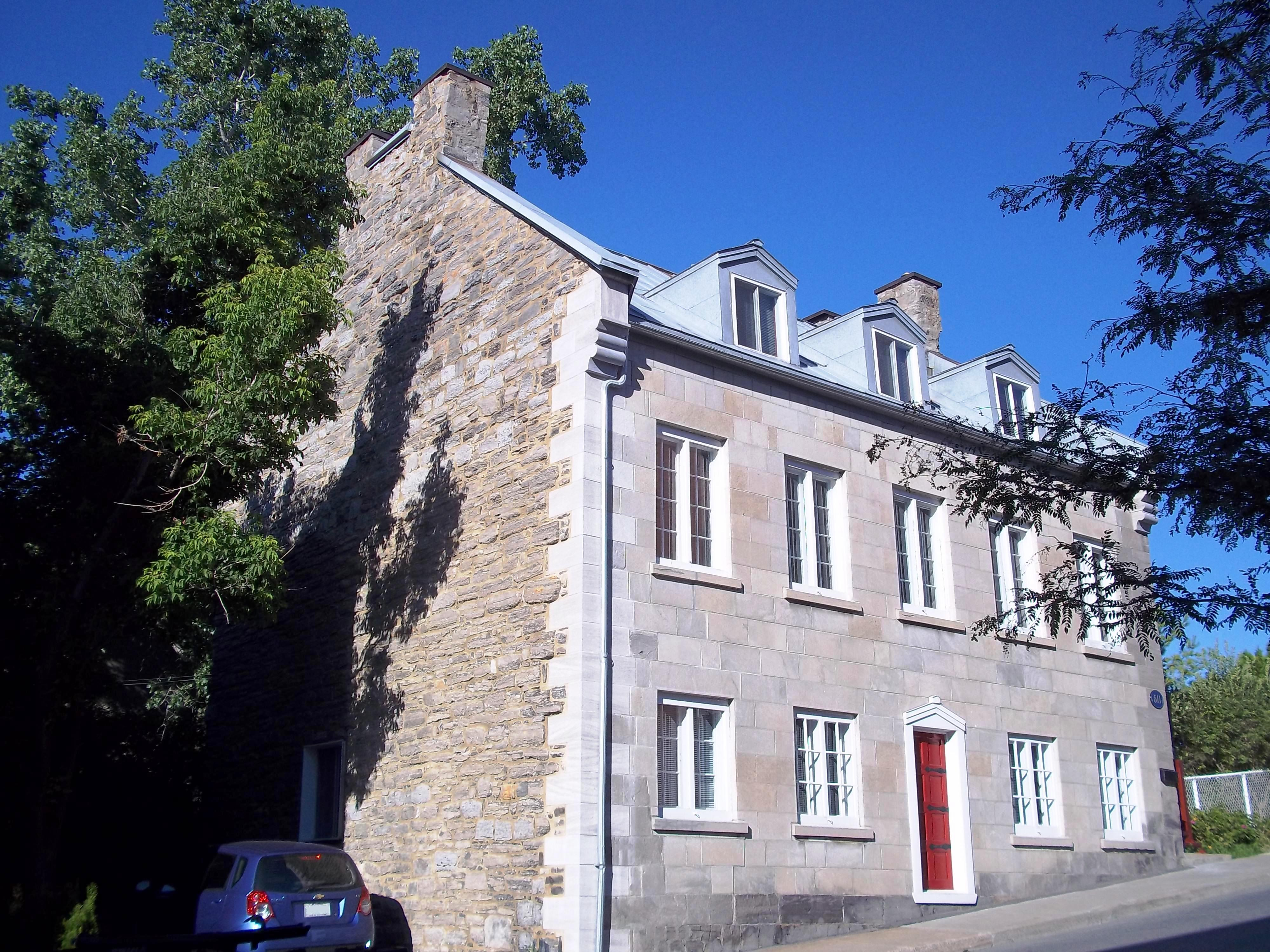 Maison Marguerite-Hay, 511, rue Montcalm, Montréal. info